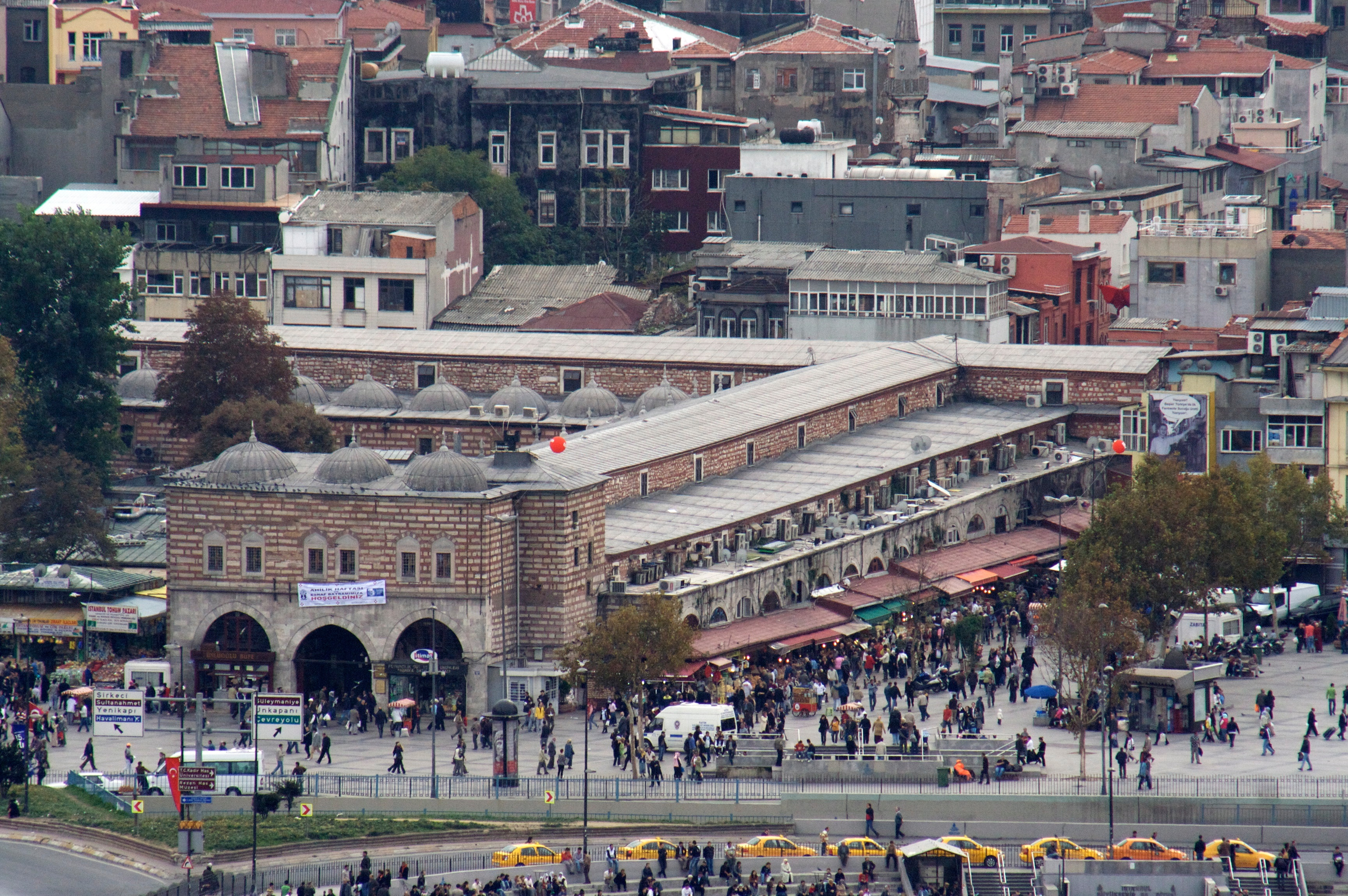 Mısır Çarşısı görünümü